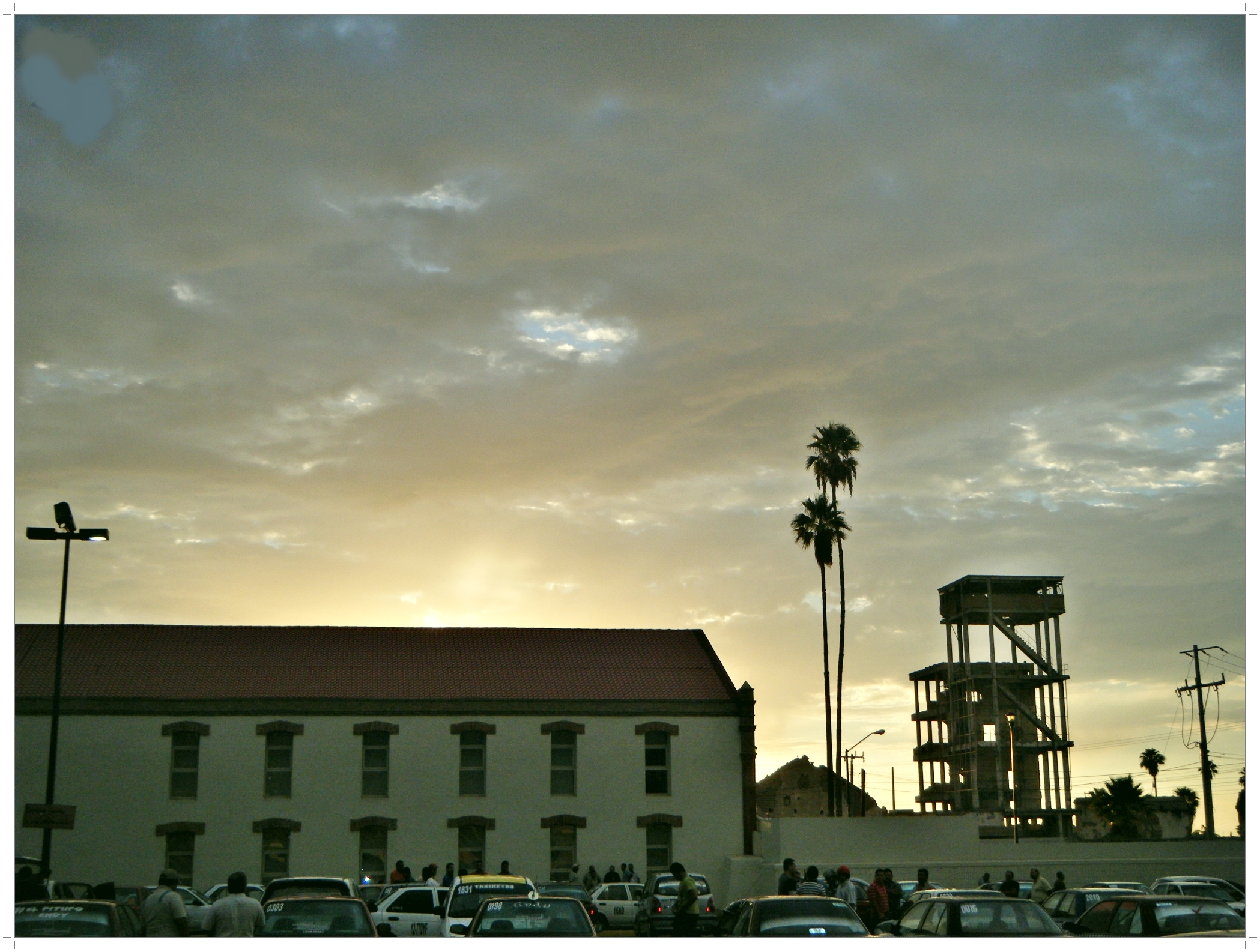 antigua fabrica de jabones